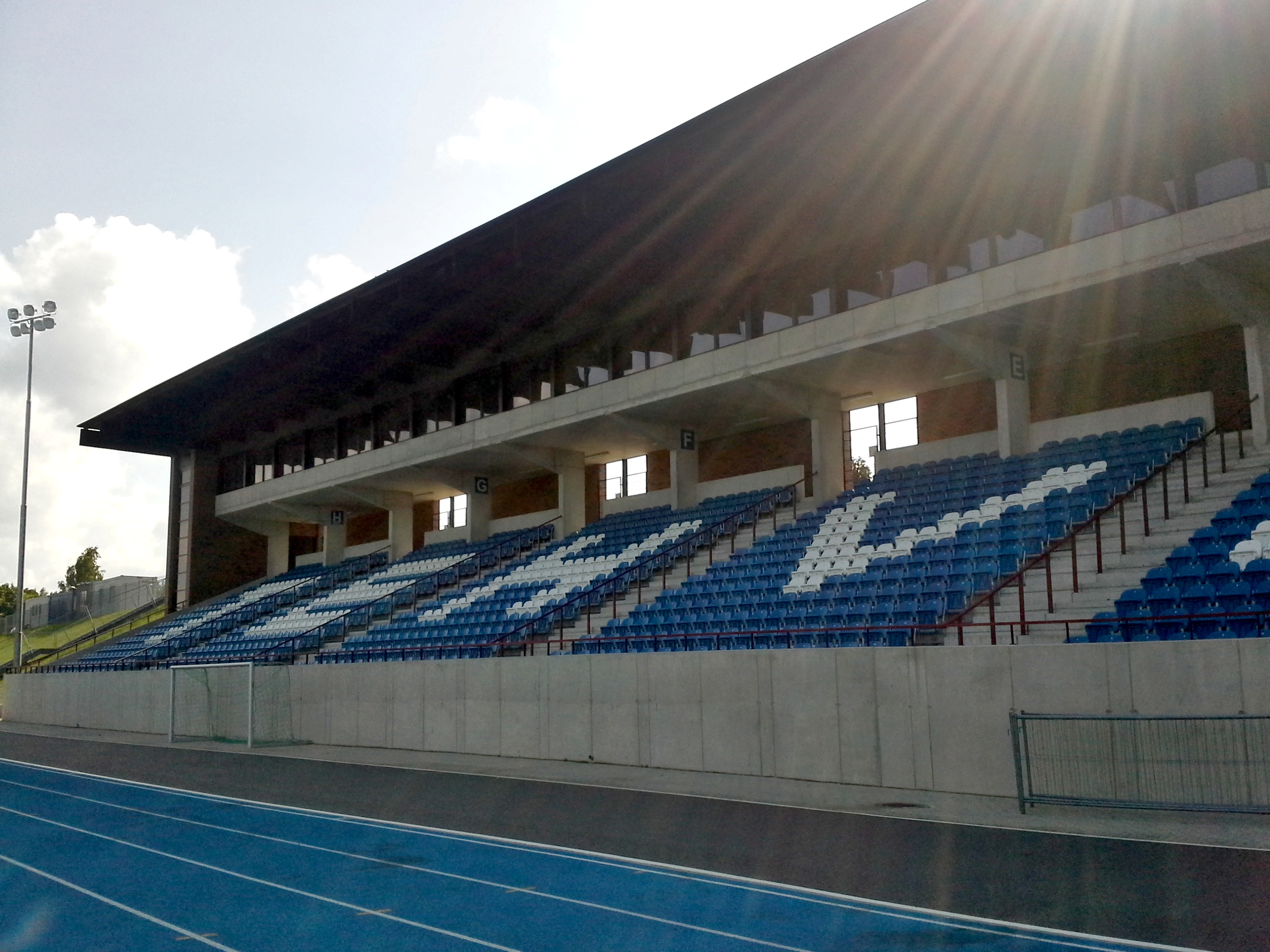 Tehvandi suusastaadionin katsomo, toukokuussa 2013.